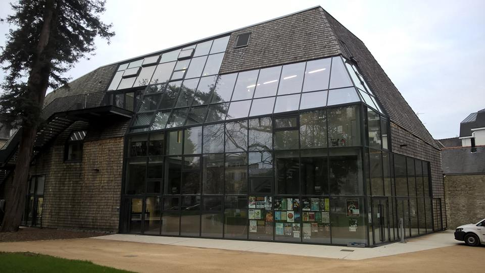 Vue extérieur du Novomax